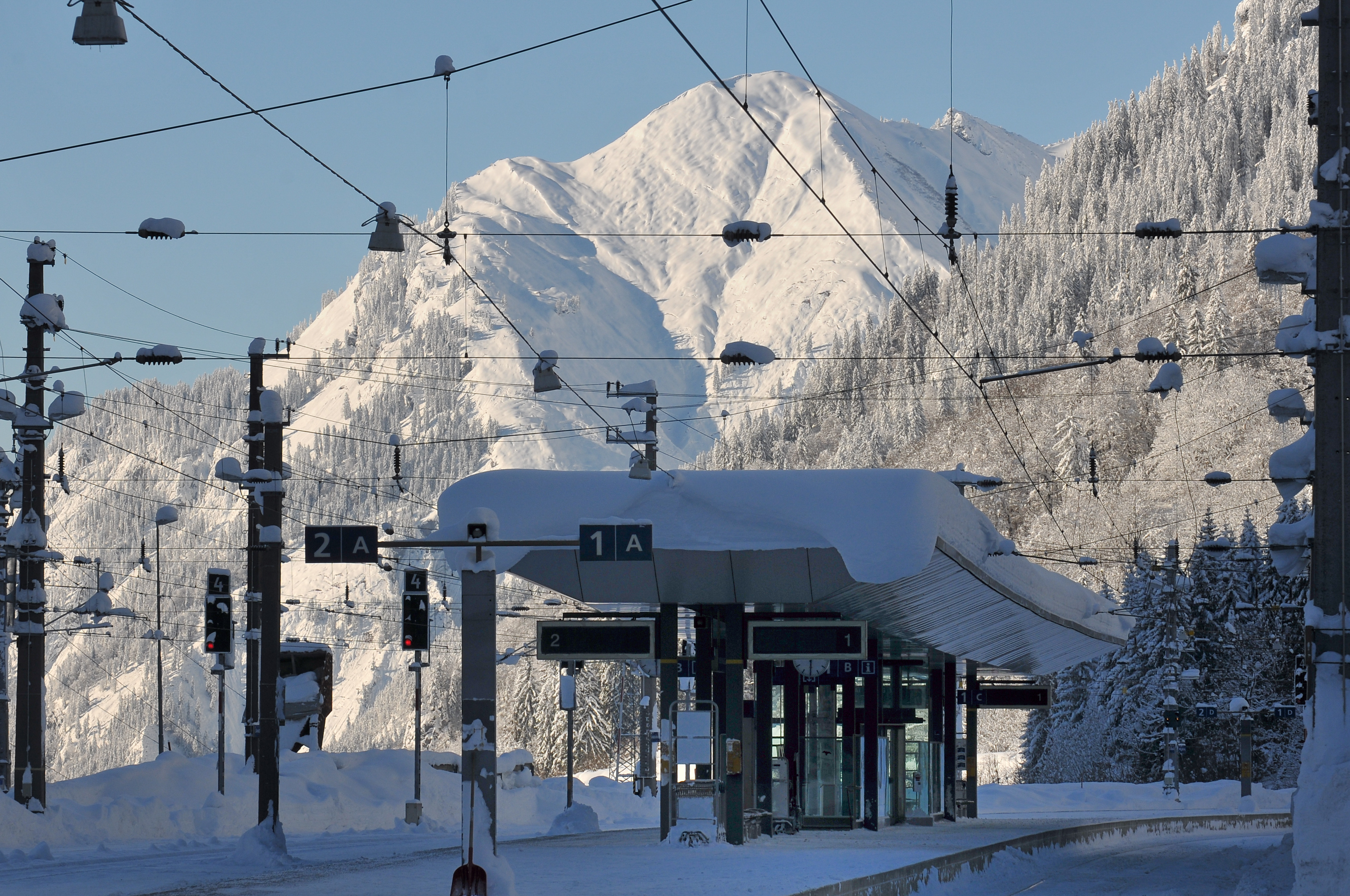 Bahnhof Langen am Arlberg. Die Arlbergbahn ist eine Eisenbahnstrecke in Österreich, die von Innsbruck nach Bludenz führt.